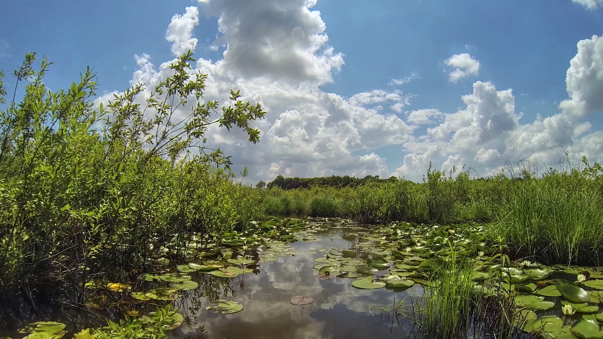 Acarlar longozu, Sakarya